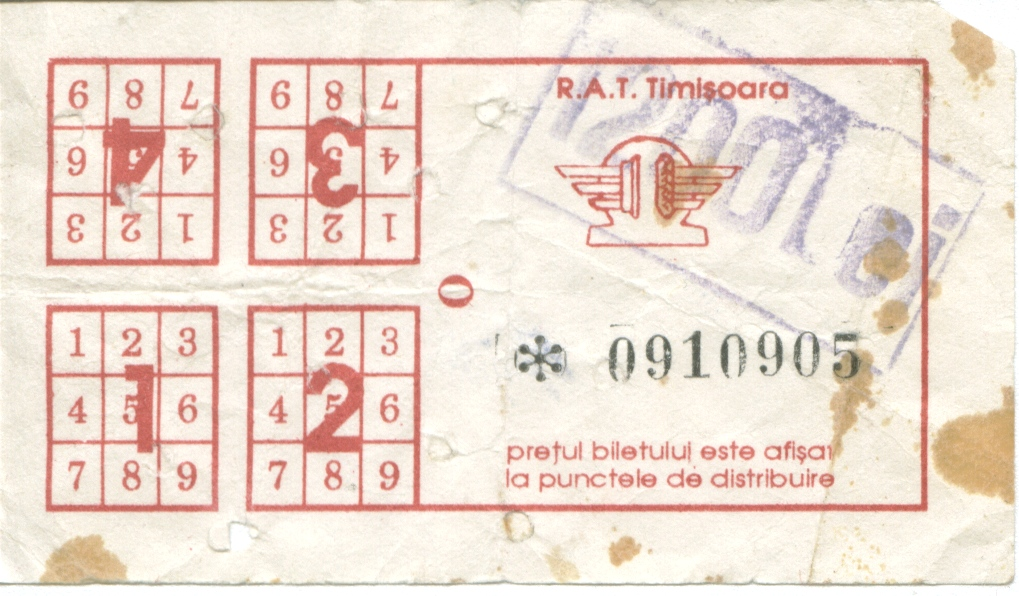 Bilet tramvai Timisoara